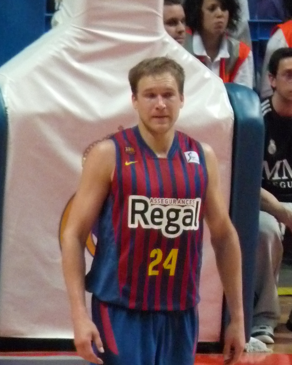 Brad Oleson